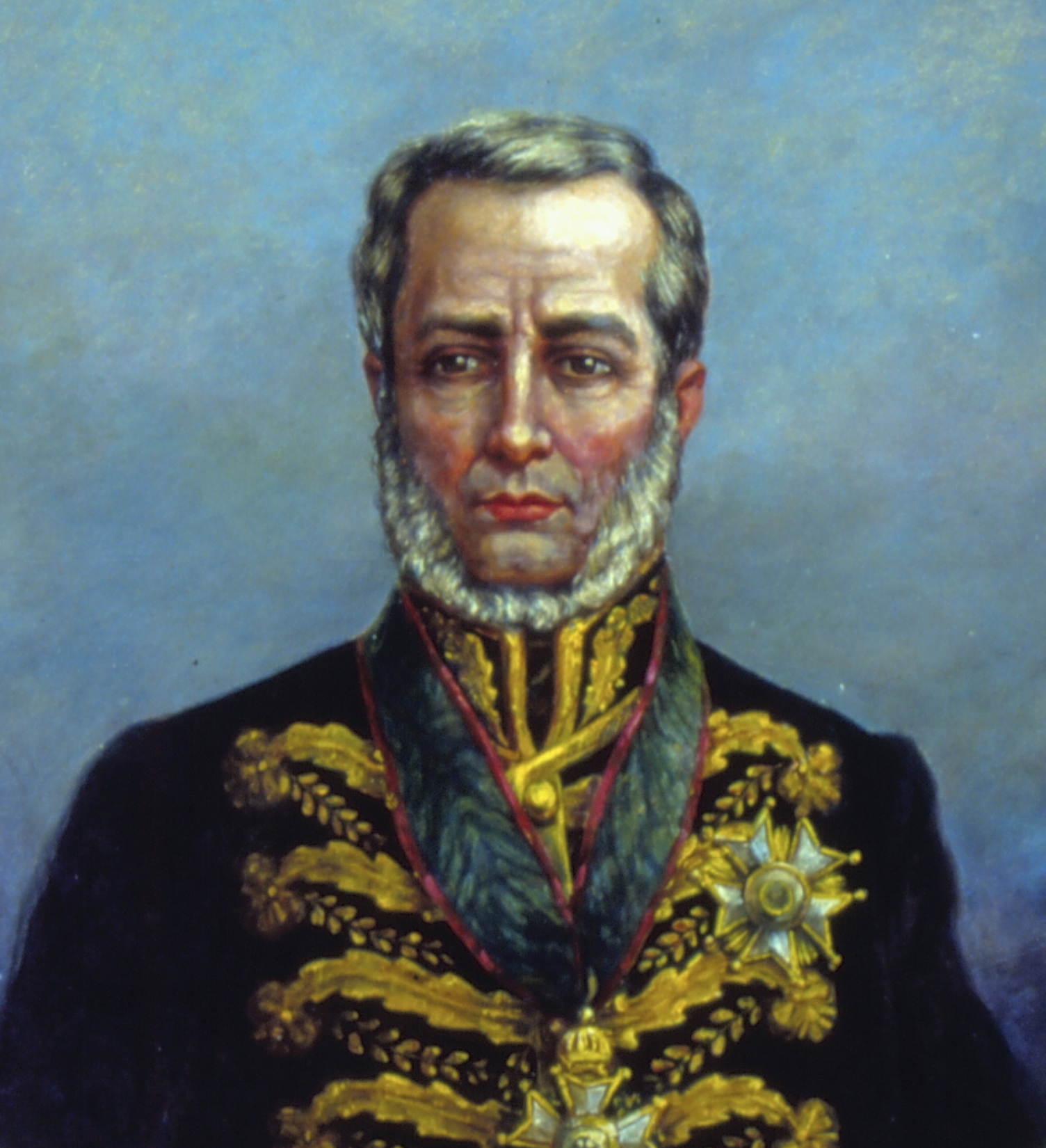 Obra que integra o acervo do Museu Paulista da USP. Coleção Fundo Museu Paulista - FMP